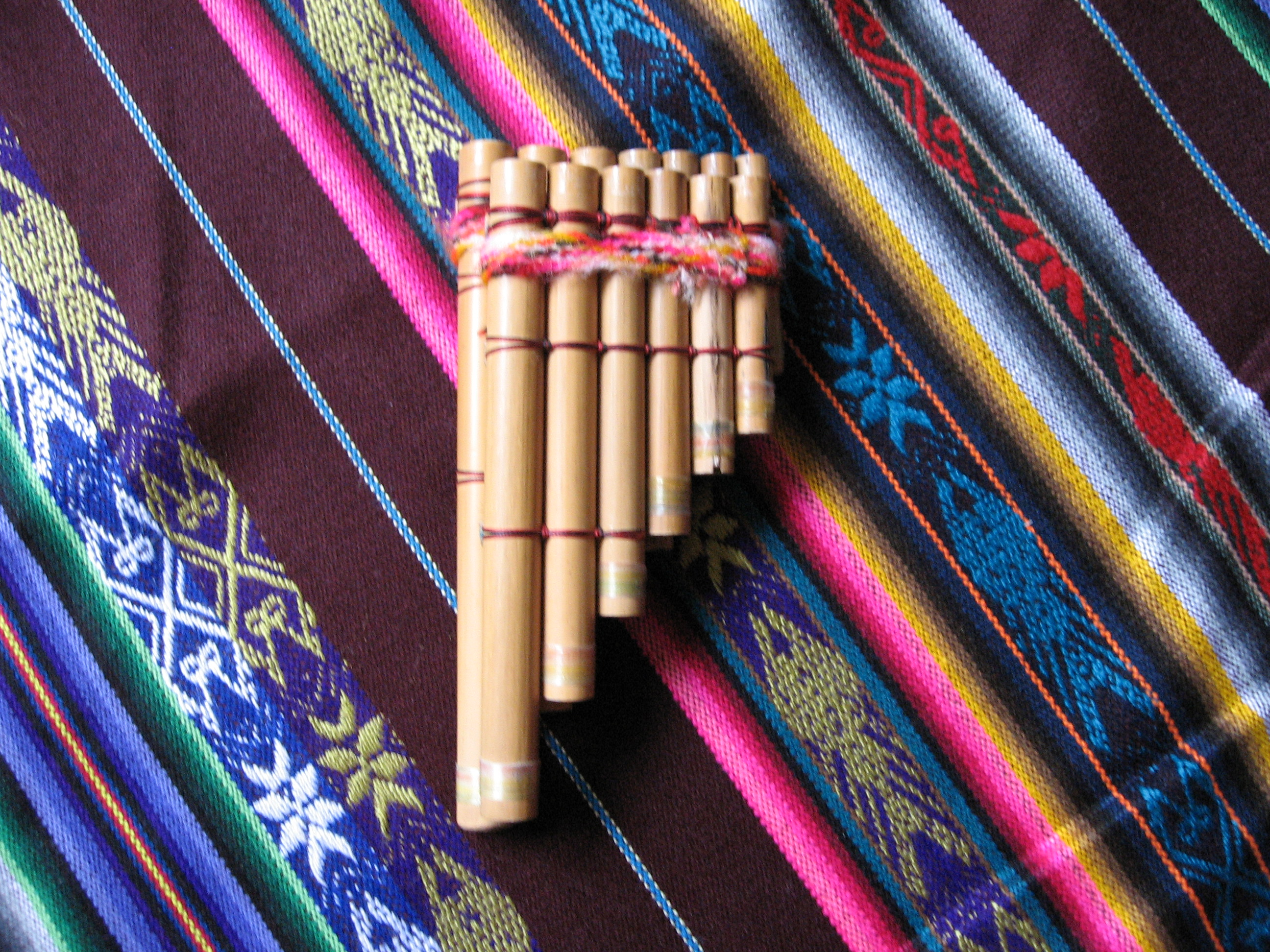 El sikus más agudo